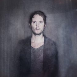 Autoportrait de l'artiste Thomas Devaux